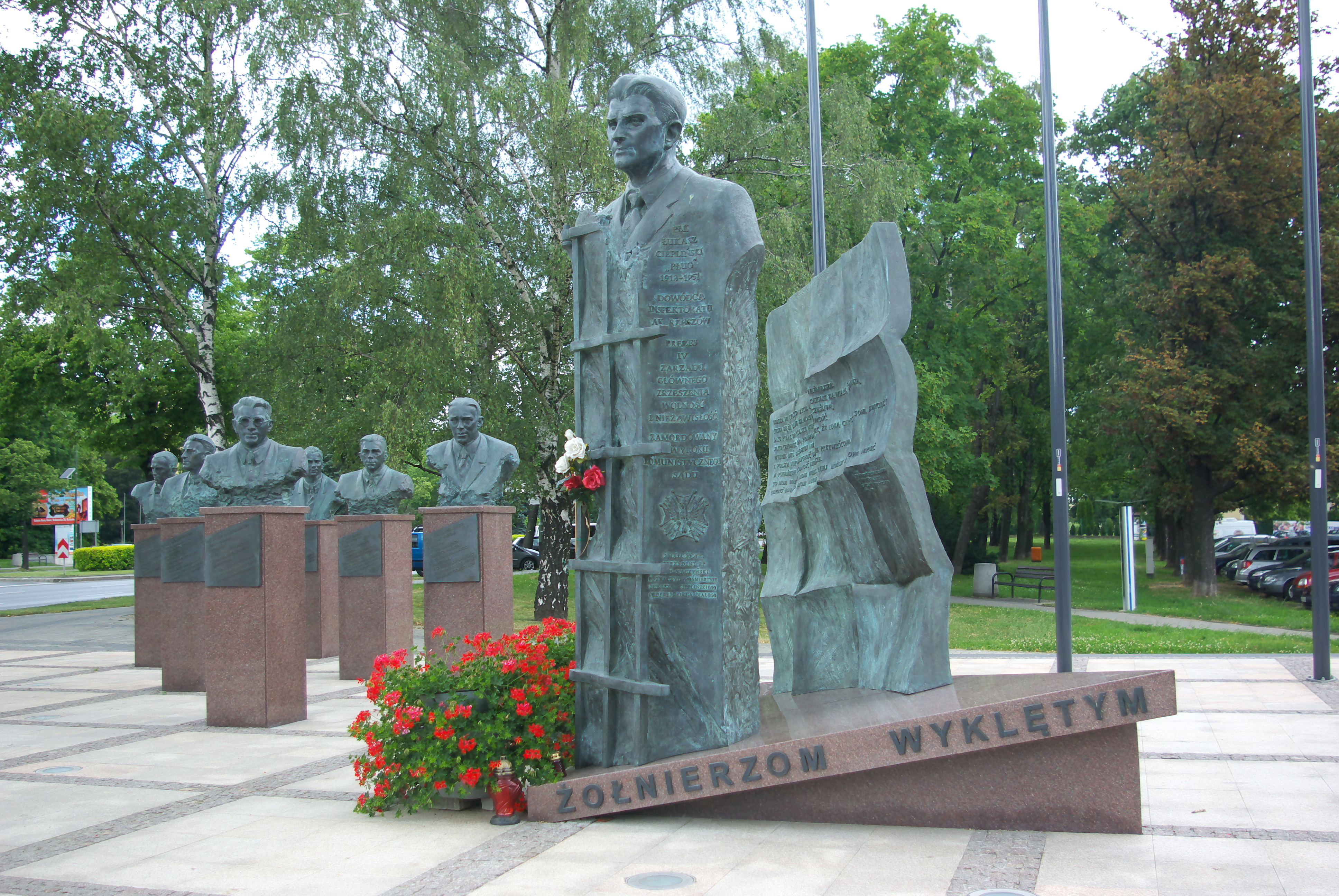 Pomnik Żołnierzy Wyklętych w Rzeszowie przy Alei Łukasza Cieplińskiego. Upamiętnieni członkowie Zrzeszenia Wolność i Niezawisłość: Łukasz Ciepliński, Adam Lazarowicz, Mieczysław Kawalec, Józef Batory, Franciszek Błażej, Józef Rzepka, Karol Chmiel.